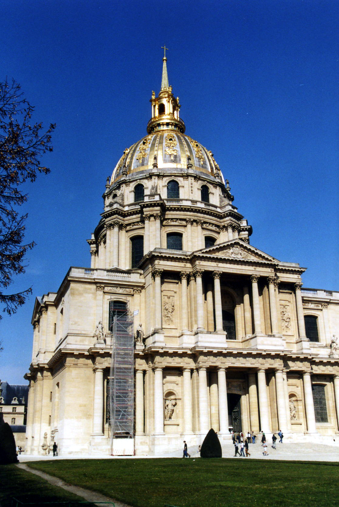 Der Invalidendom in Paris